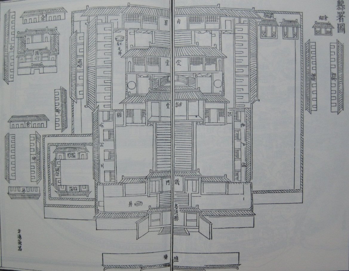 臺灣縣縣署圖